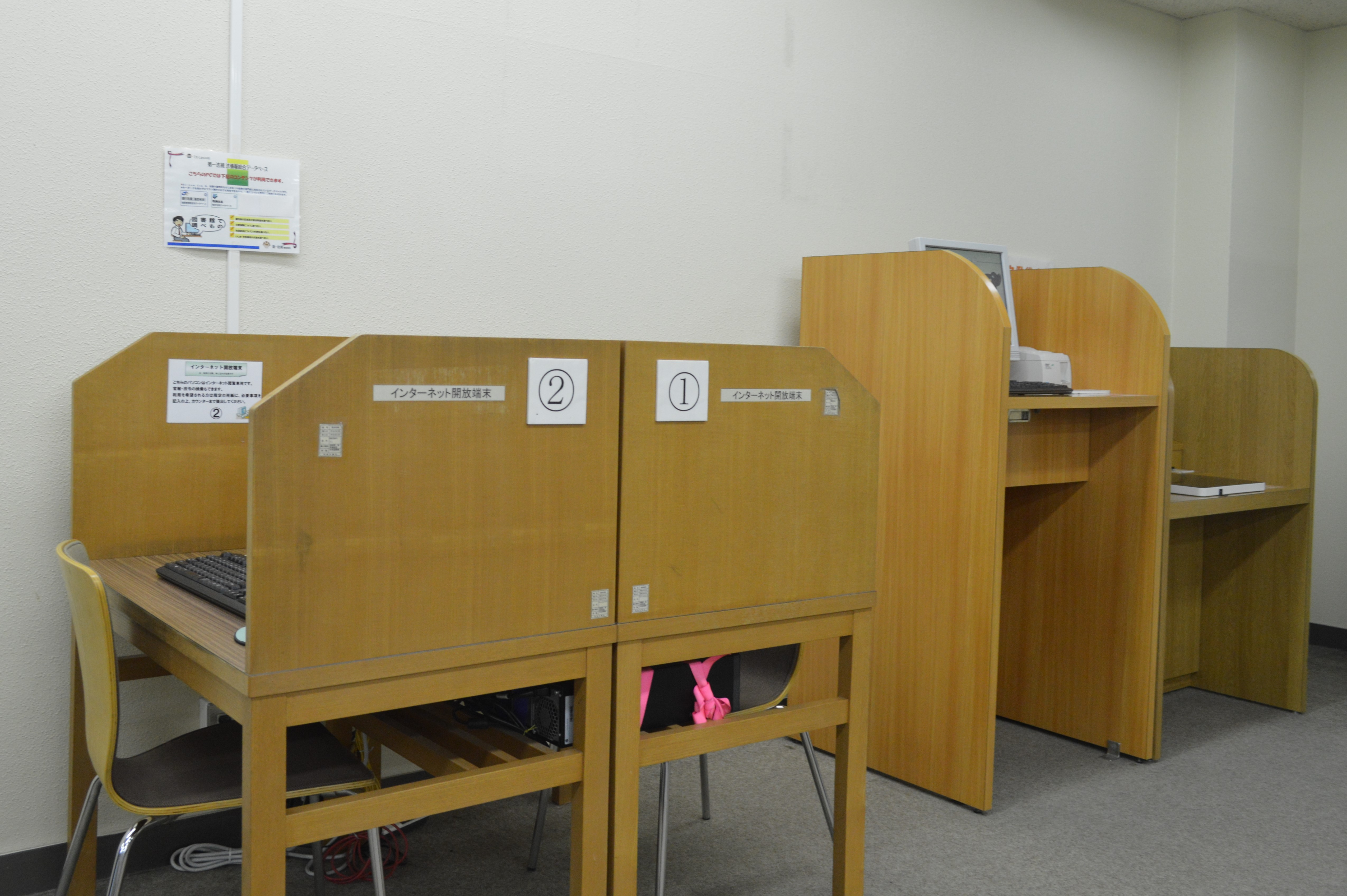 愛知県東海市にある東海市立中央図書館。インターネット開放端末。